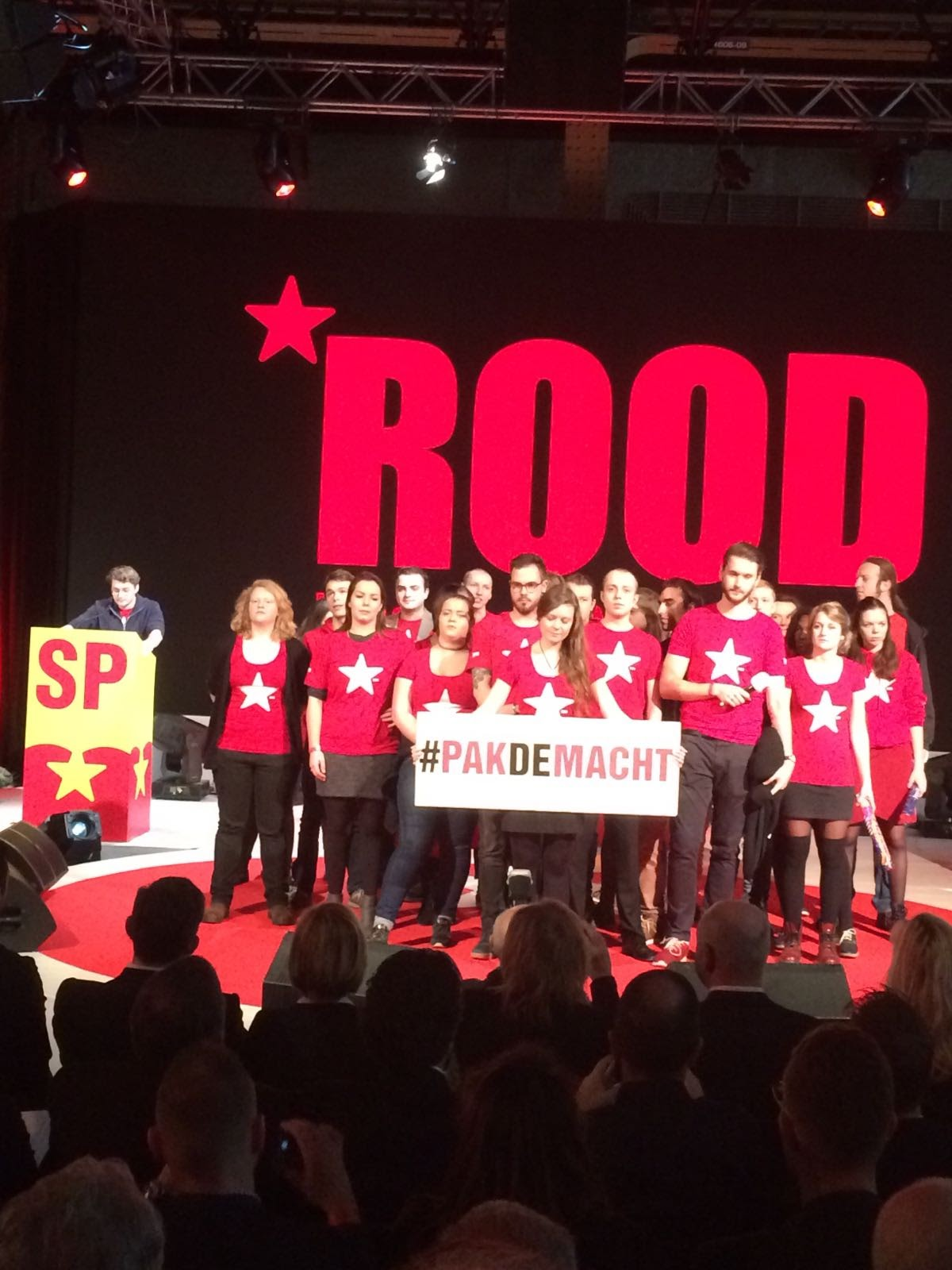 Rood tijdens het 22e SP-congres in Tilburg. pakdemacht